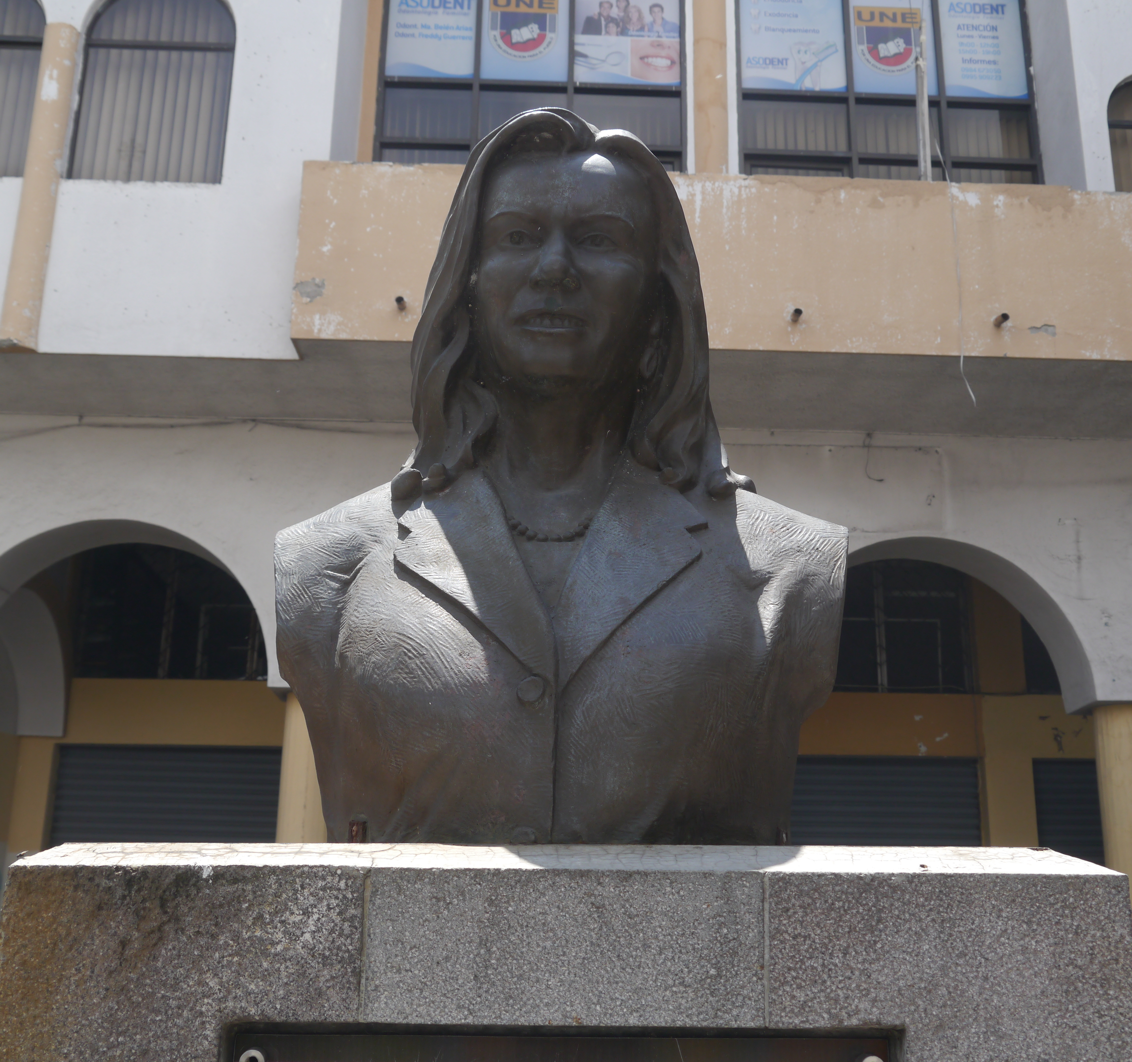 Busto de Guadalupe Larriva en Cuenca